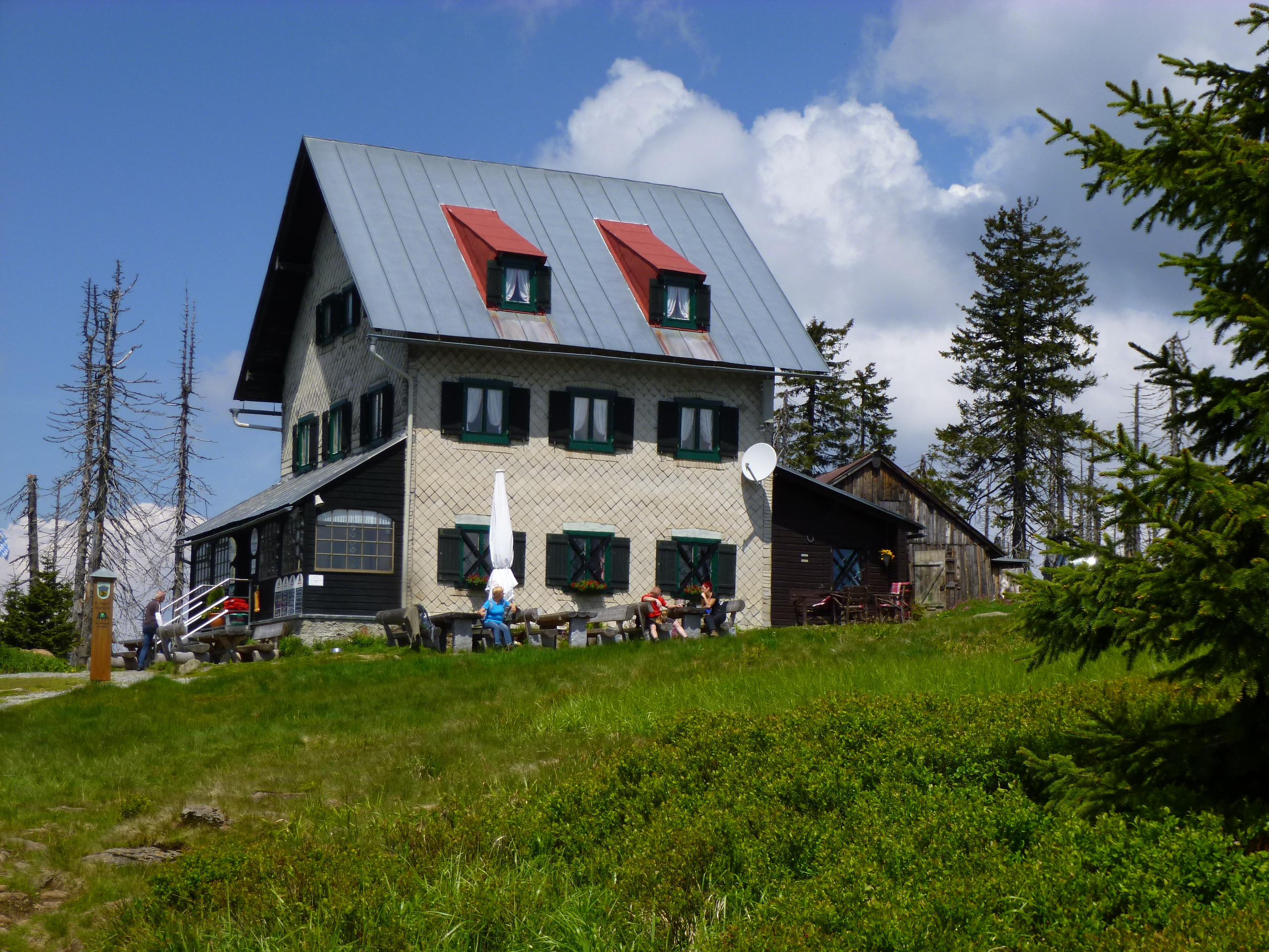 Einkehrmöglichkeit am Rachelgipfel, jedoch ohne Übernachtungsmöglichkeit; liegt etwas unter dem Rachelgipfel